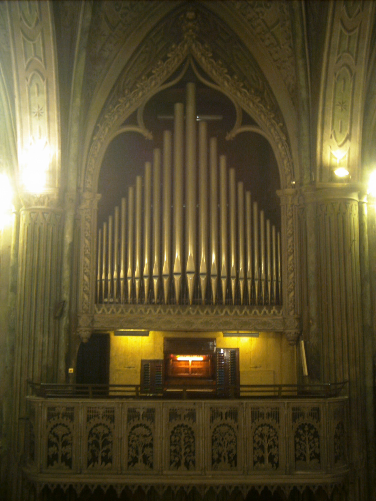 Biella, interno della Cattedrale di Santo Stefano: l'organo a canne opera di Camillo Guglielmo Bianchi (1860).